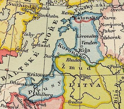 Řádové země v Pobaltí Země řádu Mečových bratří a řádu Německých rytířů kolem roku 1350 Pramen: Historicko-zeměpisný atlas školní starého, středního a nového věku, nakladatelství V. Neubert a synové, Praha (1925) jména autorů map nejsou nikde uvedena, jedná se o dílo ve smyslu $ 59 Autorského zákona menší grafická úprava -jkb- (retuše neúplných popisů) licence: Public Domain